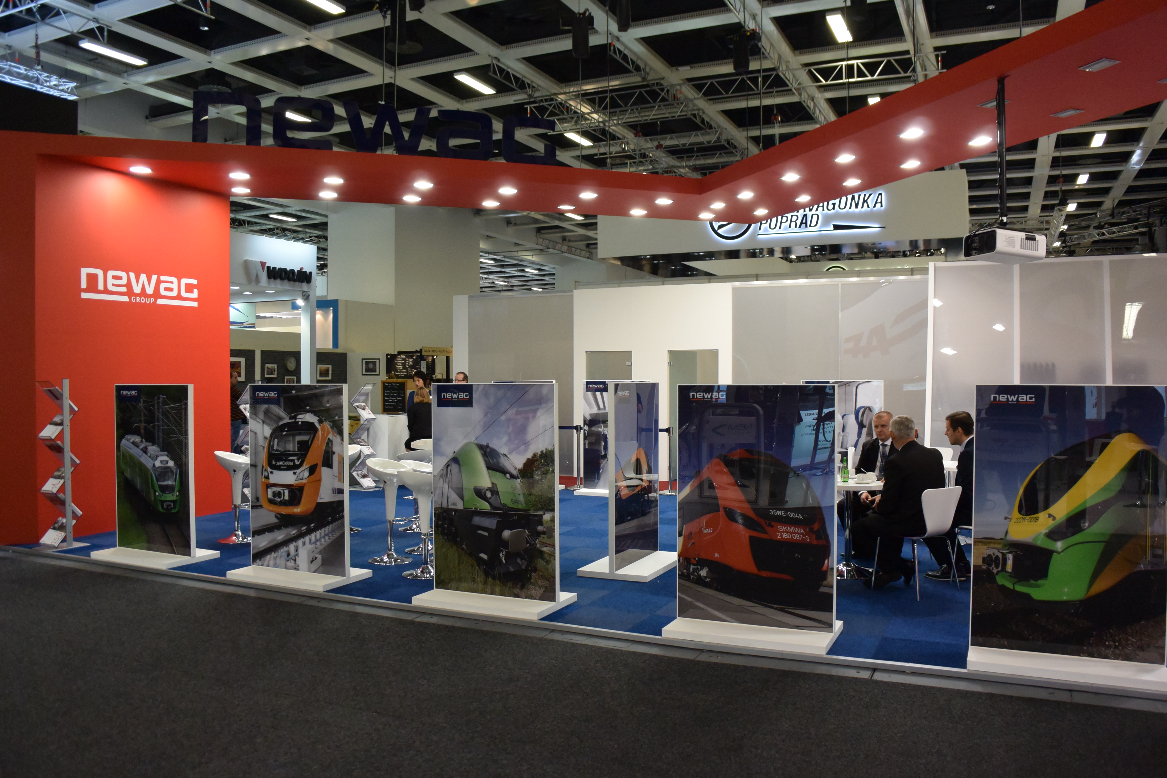 Stoisko Newag SA podczas InnoTrans 2014